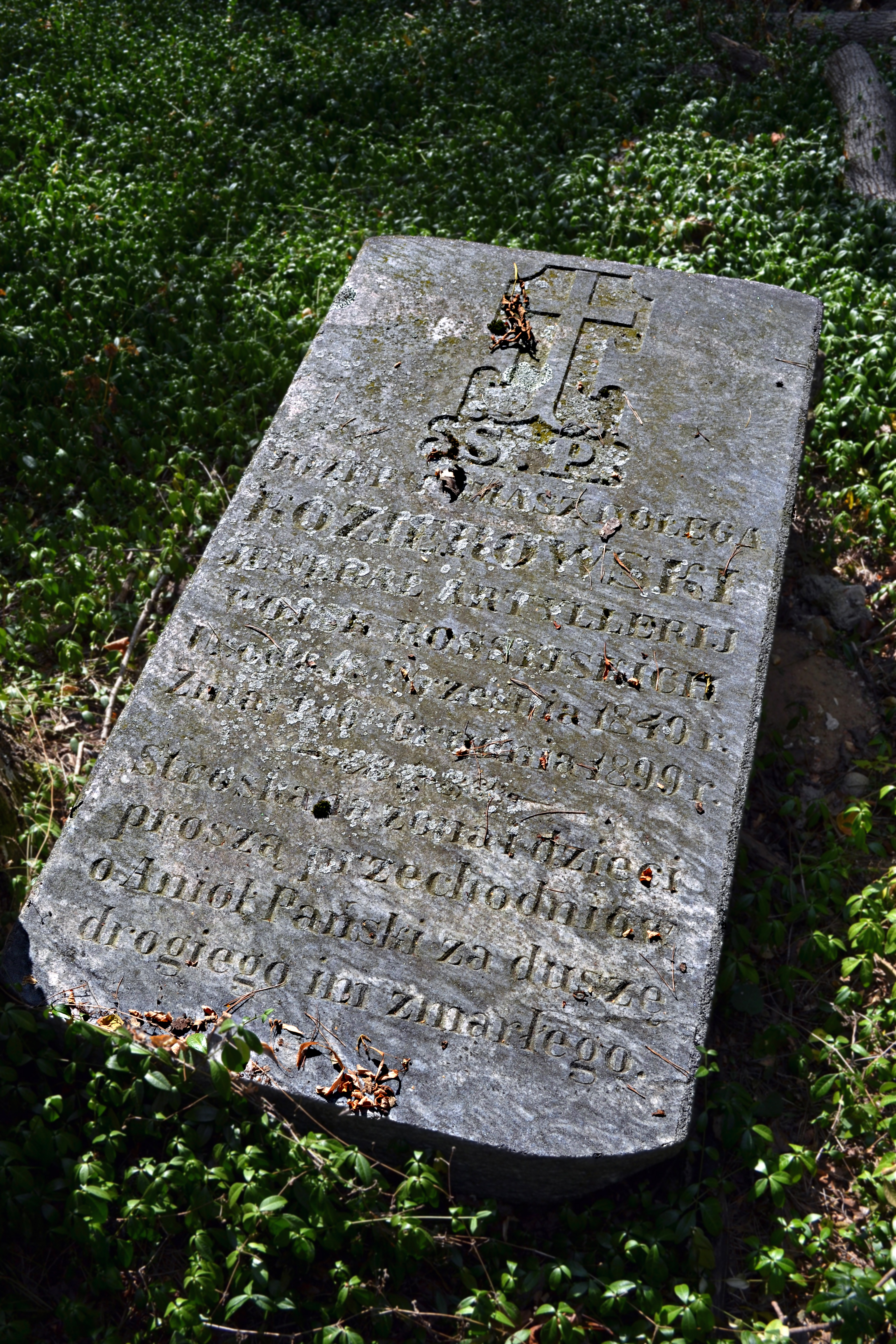 Беларуская (тарашкевіца): Надмагільле Томаша Казяроўскага, генэрала артылерыі расейскага войска, на могілках у вёсцы Барысікі (Пружанскі раён)